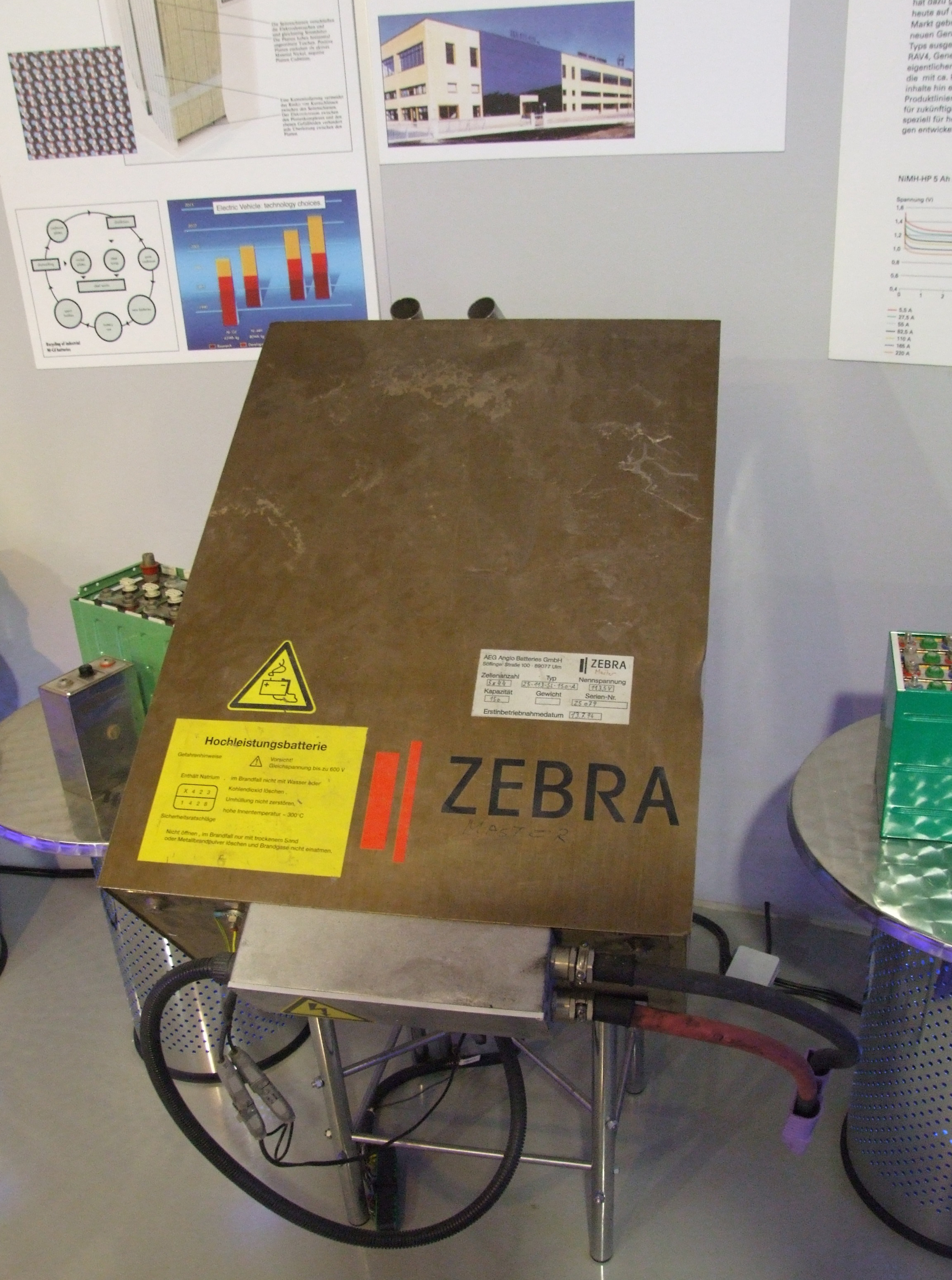 ZEBRA-Batterie, Natrium-Nickelchlorid-Batterie, Museum Autovision, Altlußheim, Germany; Molten salt battery